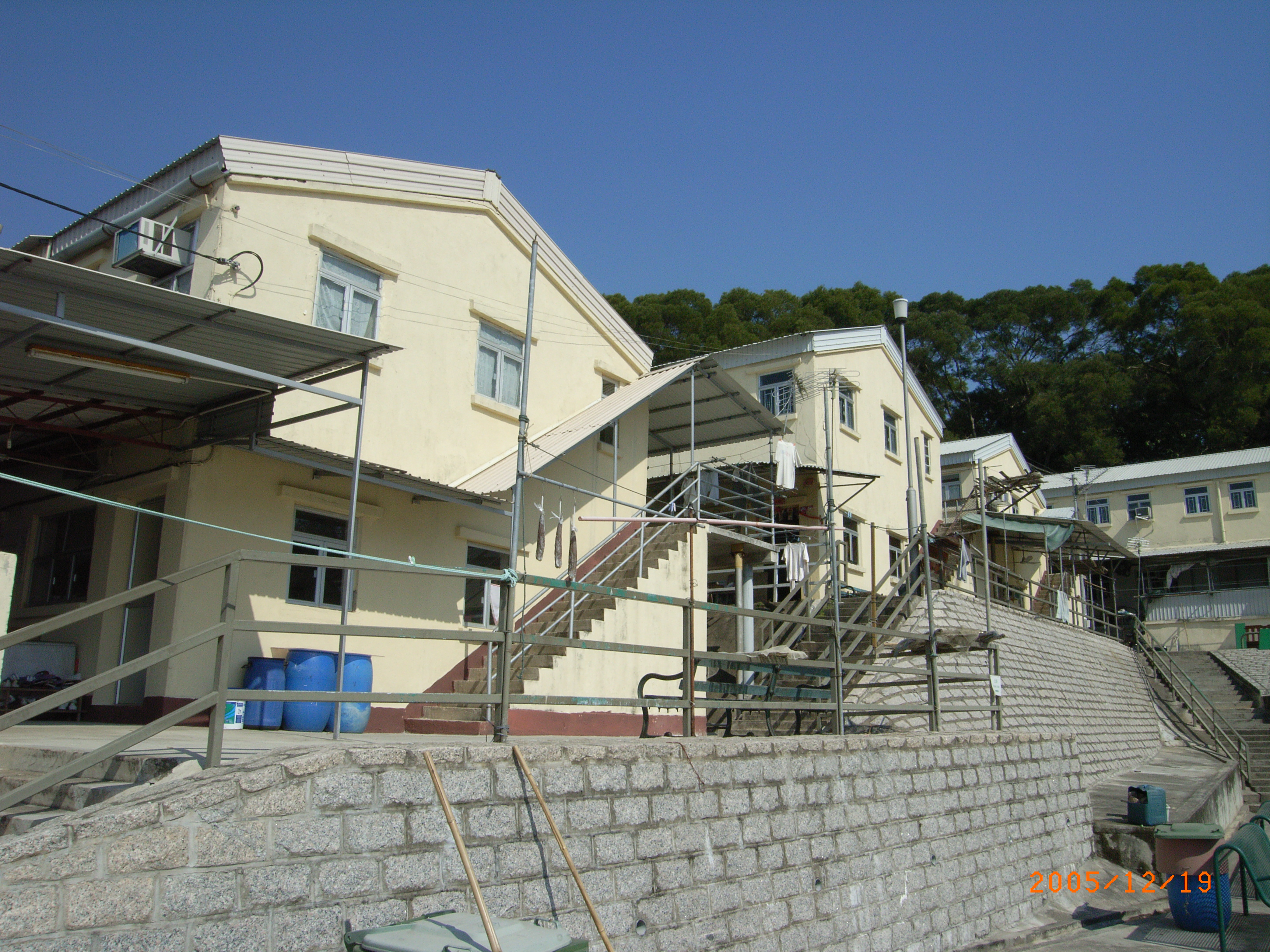 中文（香港）: 塔門漁民村2005